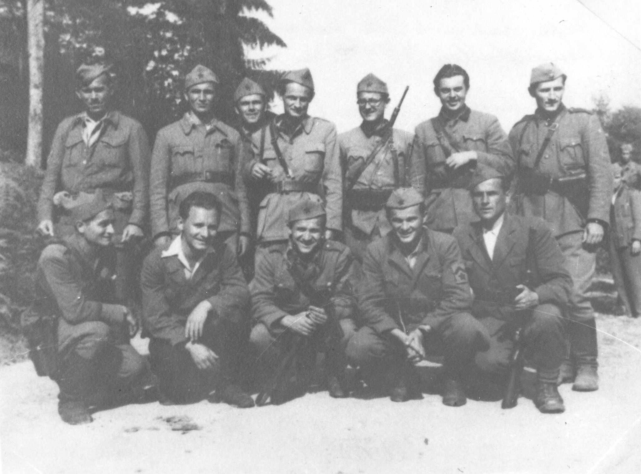 Vodstvo 6. korpusa in poveljnik glavnega štaba Hrvaške Ivan Rukavine. Stojijo od leve: /, Radovan Knežević, Franc Inkret, Ivan Rukavina, /, Mate Jerković, Marijan Cvetković. Čepijo od leve: Lazar Vidović, Andjelko Kučišec, Petar Drapšin, Franjo Knebl in Milan Stanivuković.